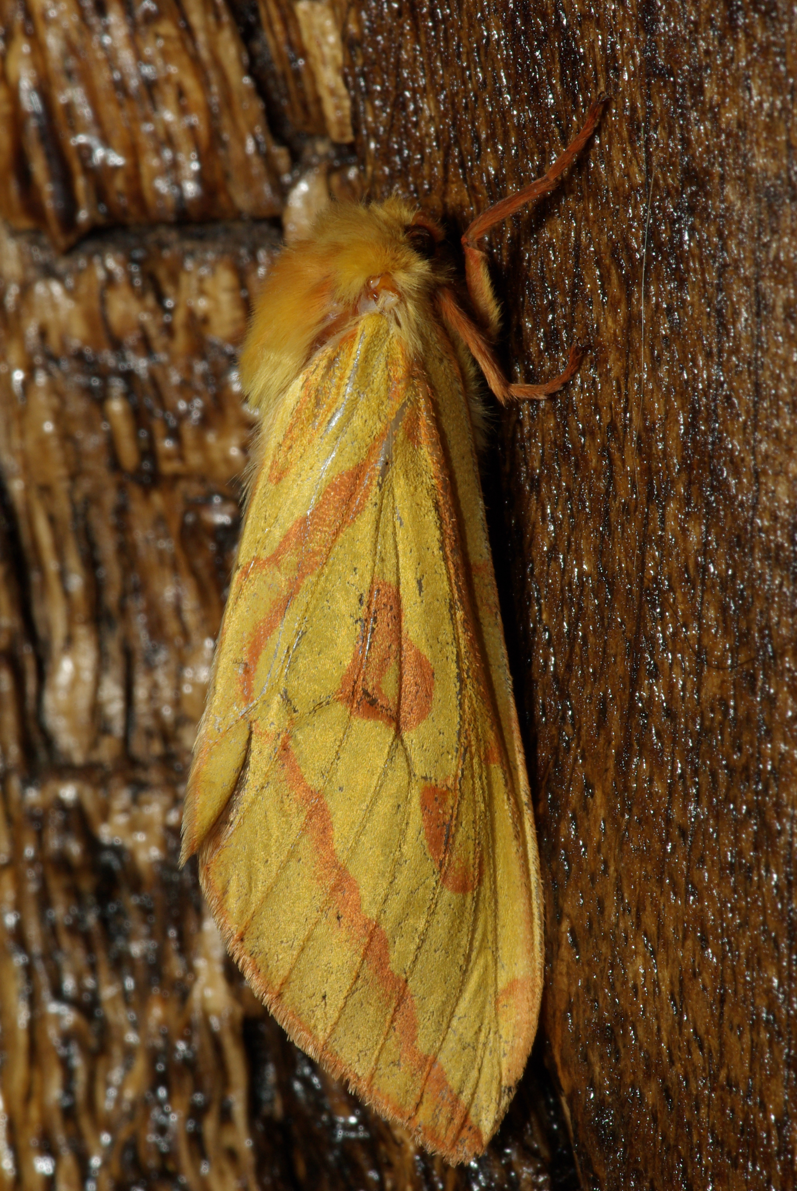 Hepialus humuli (hepiale du houblon) photographiée en Normandie.